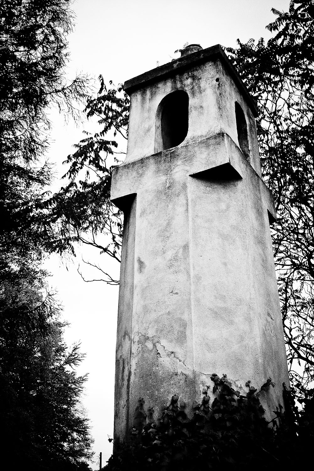 Otmice - historyczna wieżyczka "kapliczka" przeniesiona z leśniczówki na teren szkoły podstawowej